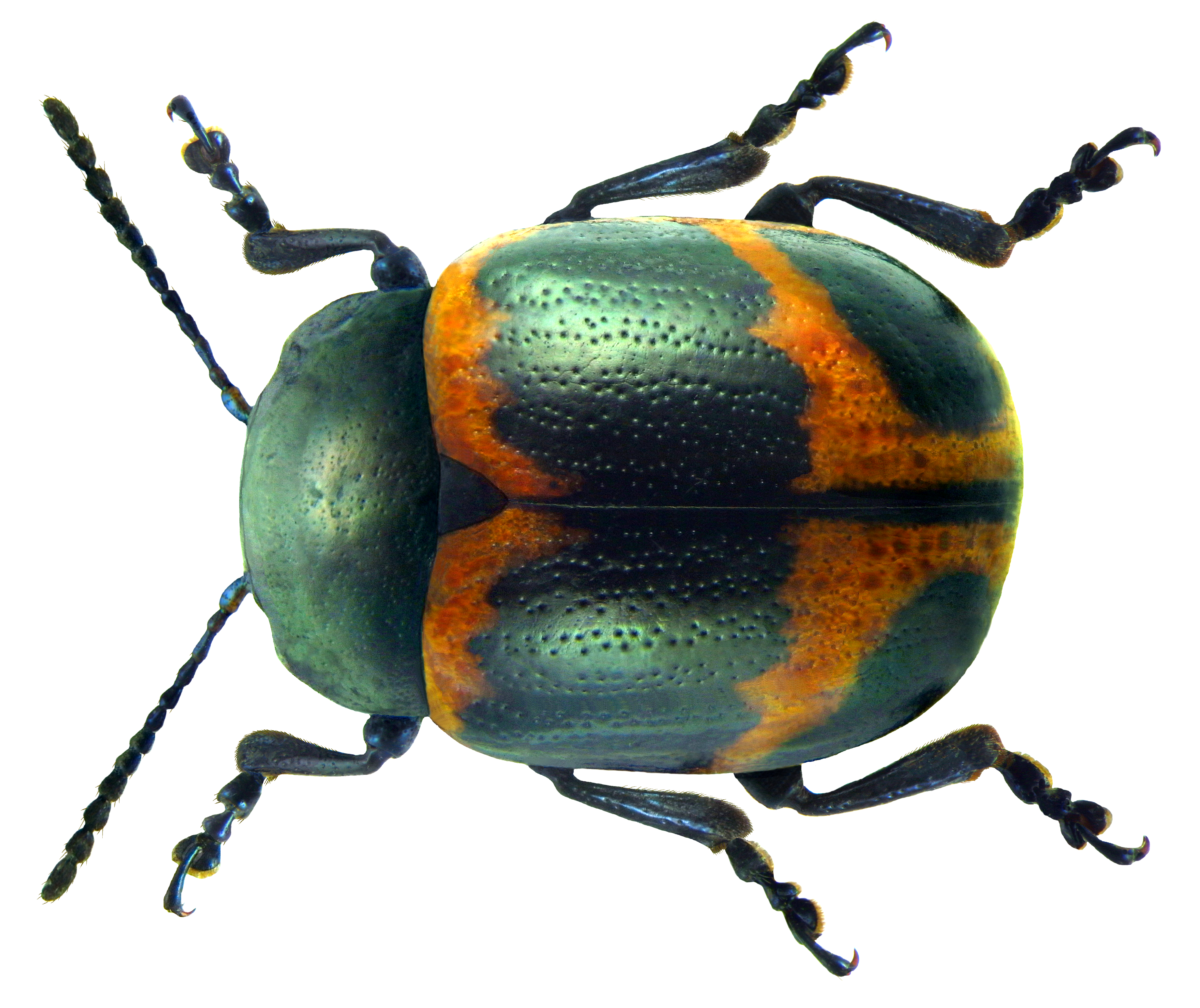 Family: Chrysomelidae Size: 9.8 mm Location: USA, Florida, Gainesville, Paynes Prairie State Park U.Eitschberger leg, 2.X.2010; det. U.Schmidt, 2011 Photo: U.Schmidt, 2011